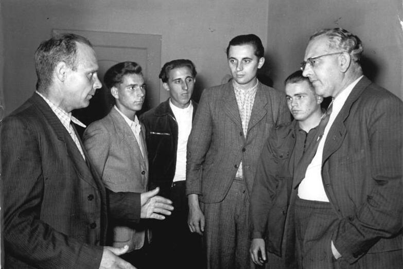 Rudolf Jahn im Gespräch Unsere Mähdrescherführer sind bereit. Nur noch wenige Tage bis zum Beginn der einbringenden Ernte 1953. Bald werden die Mähdrescher aus der Sowjetunion über die Felder rollen. Im Bezirk Dresden werden 16 Stalinnetzt 4 und eine Gesamtfläche von etwa 3 200 Hektar mähen. rechts, der Vorsitzende des Rates des Bezirkes Rudi Jahn im Gespräch mit den Kombineführern (v. links) Kollg. Schmidt, Ternes, Große, Roßberg u. Lätsch Zentralbild-Braun 1.7.1953 Unser Mähdrescherführer sind bereit UBz: (rechts) Der Vorsitzende des Rates des Bezirkes Dresden Rudi Jahn lässt sich con den Kombine-Führern (vlnr) Schmidt, Termes, Grosse, Rossberg und Lätsch ihren Einsatz bei der diesjährien Ernte erläutern. Im Bezirk Dresden werden 16 Kombines vom Typ "Stalinez 4" eine Gesamtfläche von etwa 3200 ha bearbeiten. Abdruck nur mit Urheberangabe